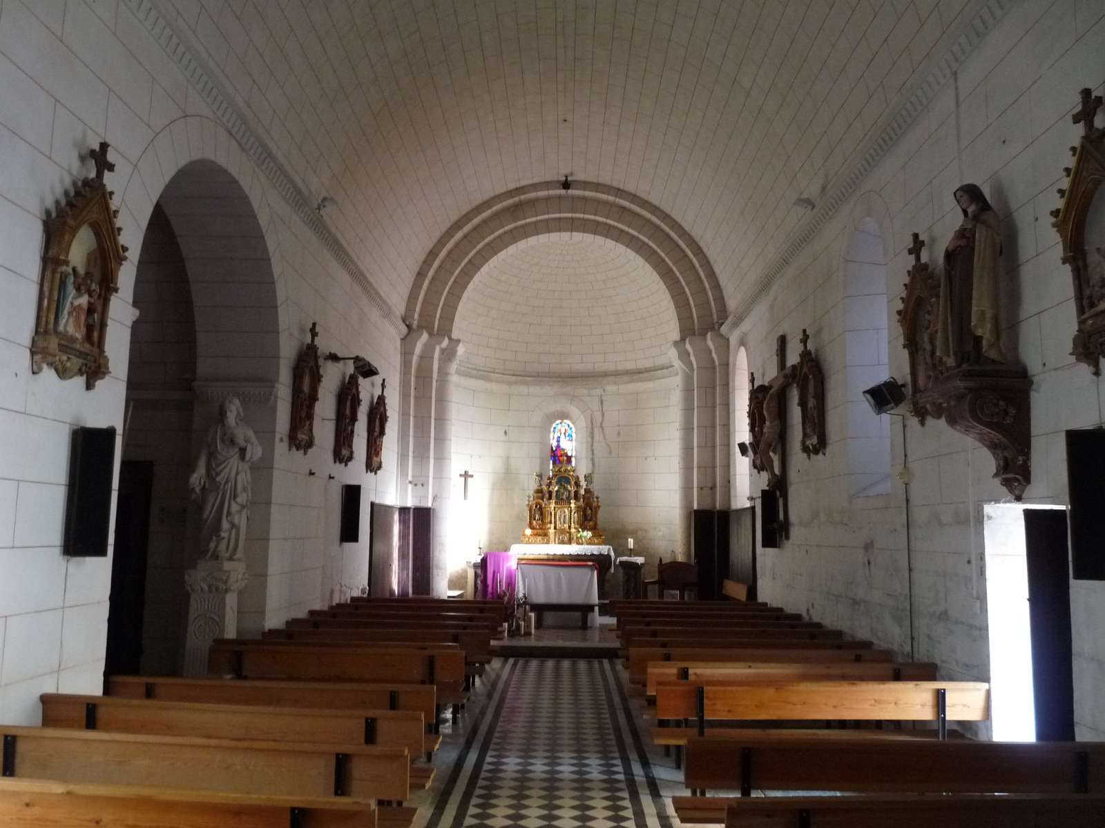 église d'Hiersac, Charente, France